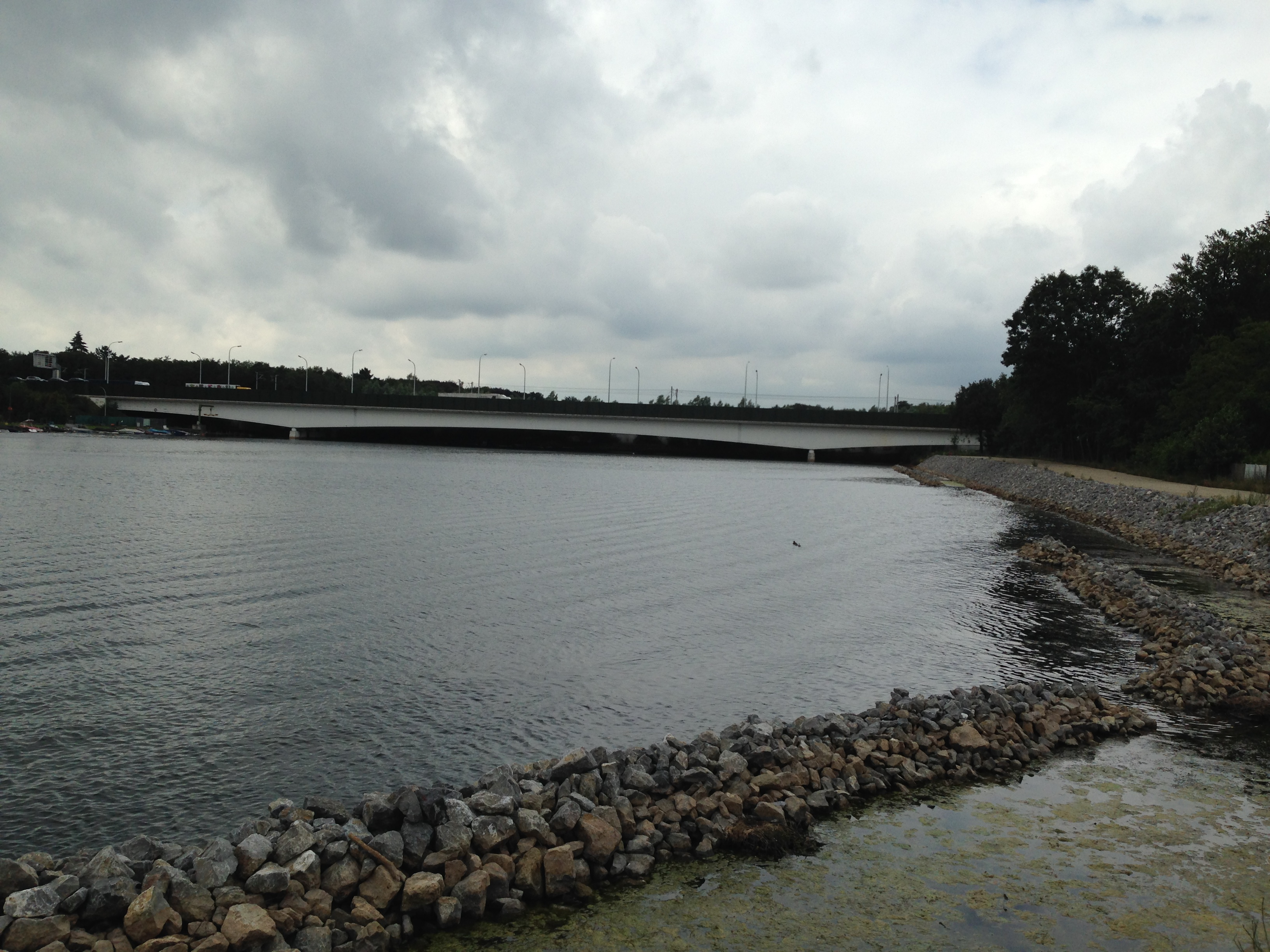 E10 plas, oorspronkelijk gegraven als onderdeel van het (ongerealiseerd) duwvaartkanaal Oelegem-Zandvliet. Doet thans dienst als recreatiedomein